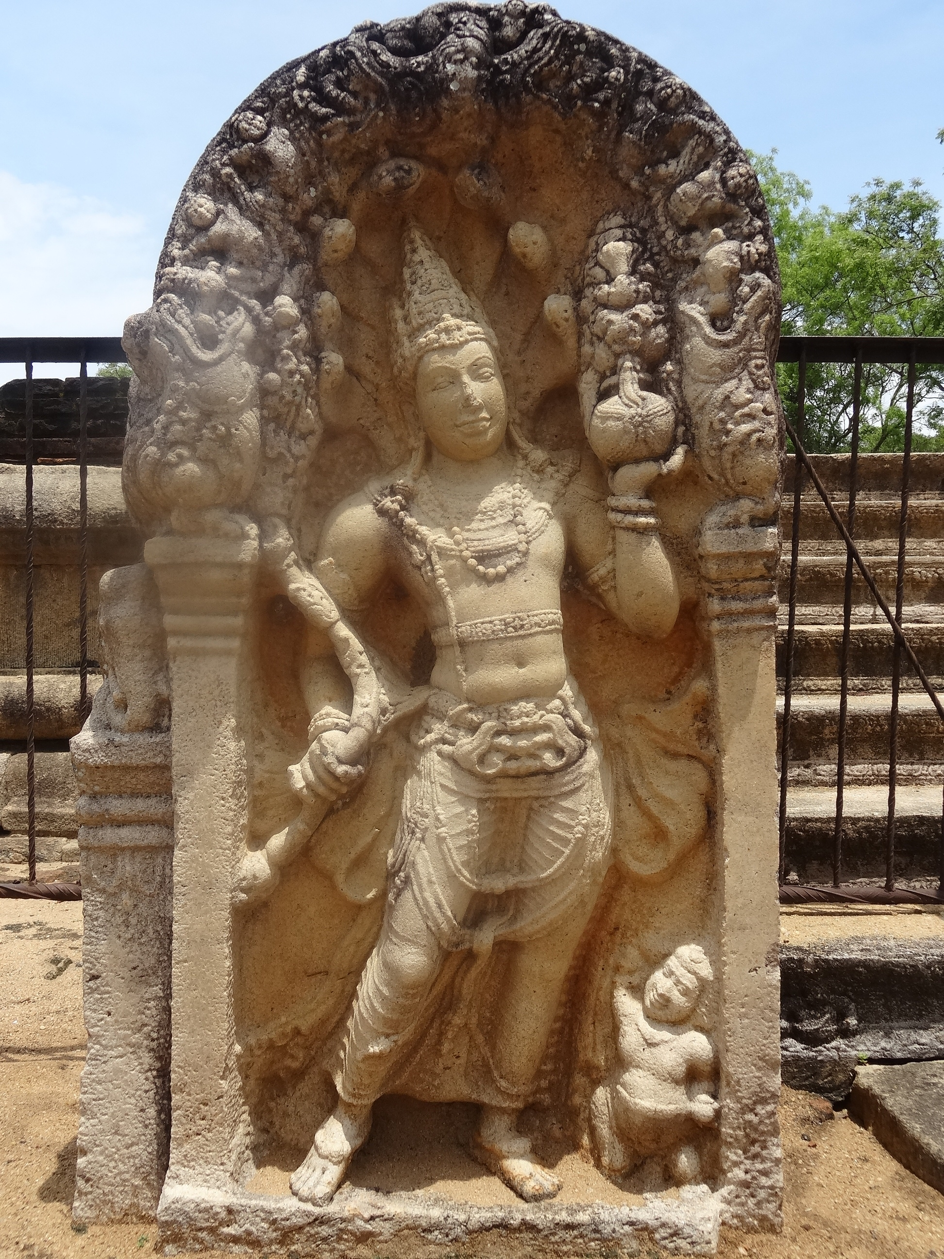 Chapter house, Anuradhapura